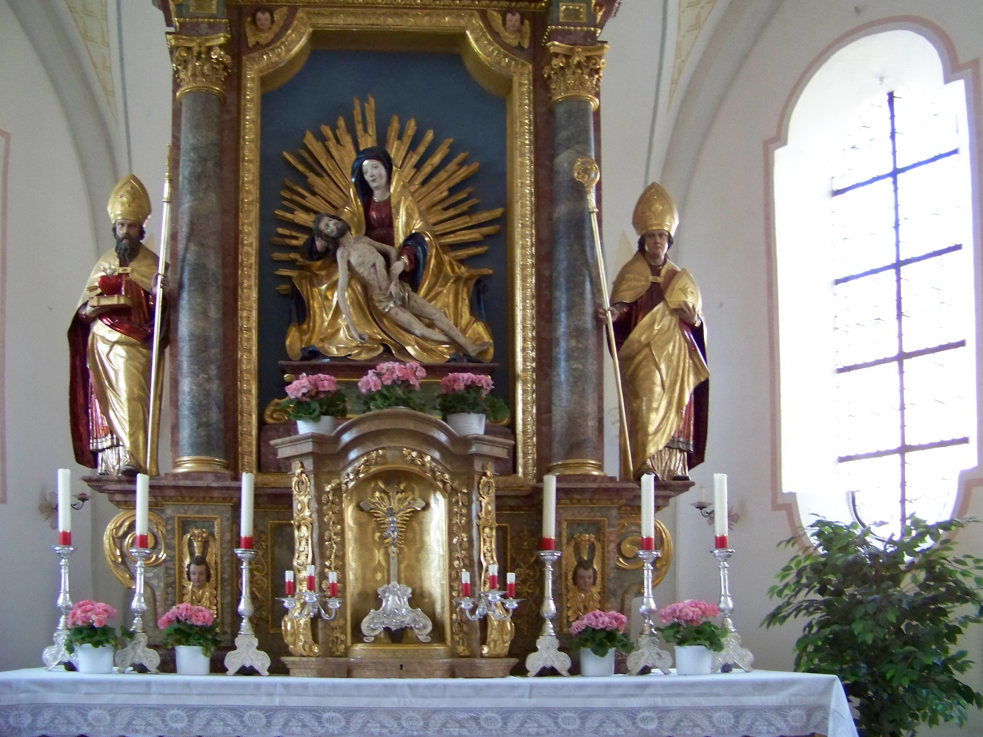 Linden, Kindergartenweg 7. Katholische Filialkirche Sankt Maria und Maternus, genannt Maria zu den Sieben Schmerzen. Barocker Saalbau mit westlichem unverputztem Satteldachturm, ehemals Chorturm um 1400. Saalbau von Melchior Höck 1629/30; mit Ausstattung. Hochaltar mit Vesperbild und den Seitenfiguren St. Augustinus und St. Maternus.